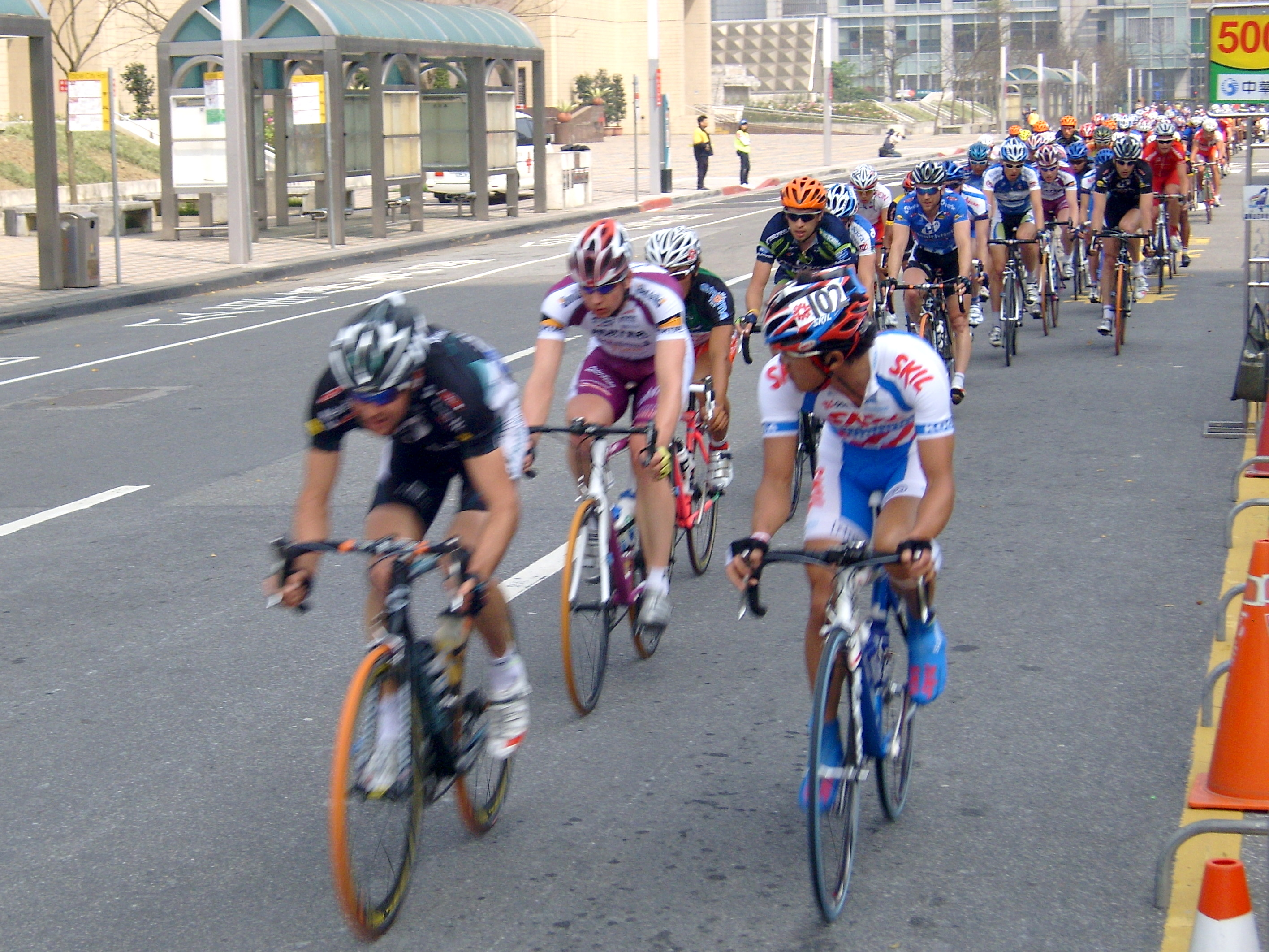 2008 Tour de Taiwan Stage 8.